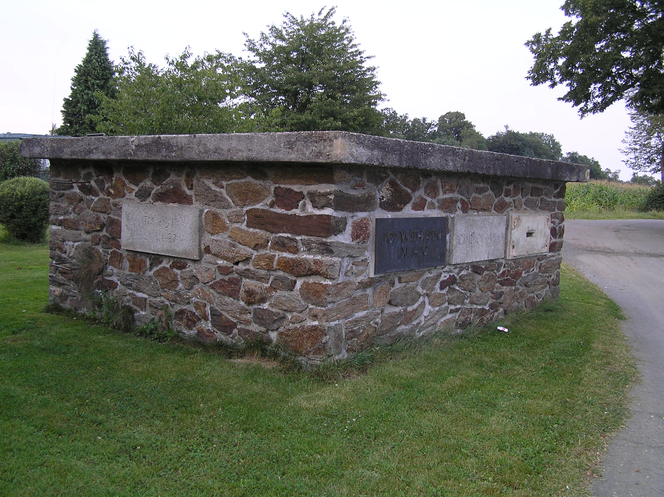 Pomník husitského vítězství roku 1431 na Baldovském návrší - základní kámen, Luženičky.